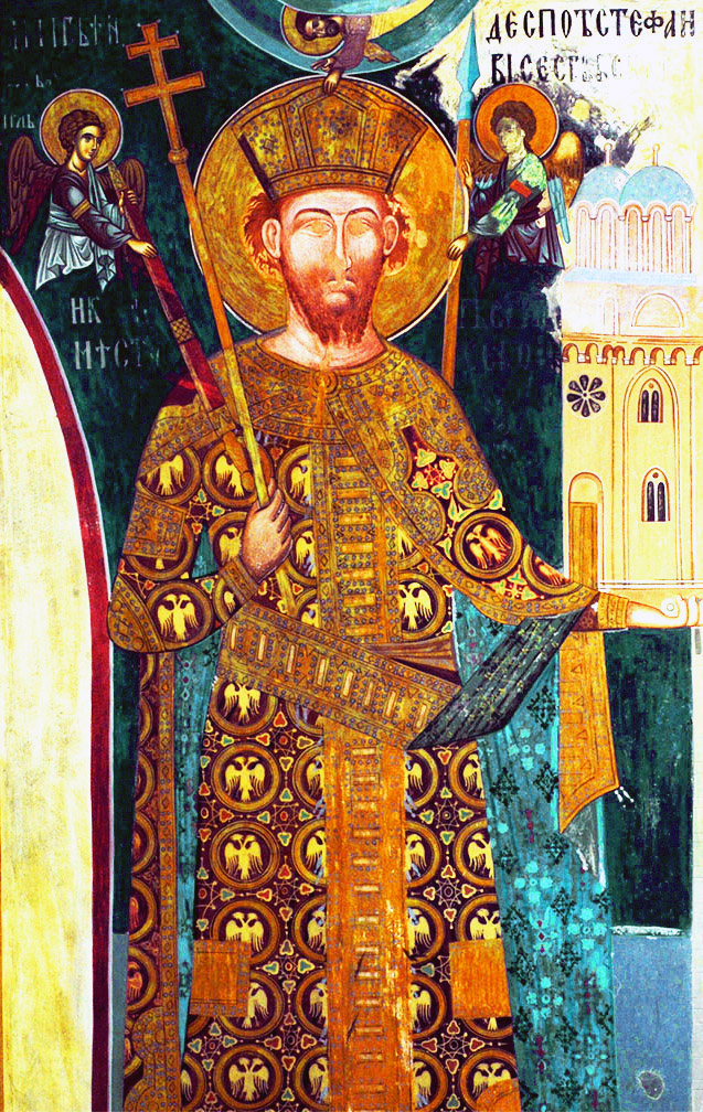 Fresco de Esteban Lazarević en el monasterio de Manasija, cerca de Despotovac, Serbia.